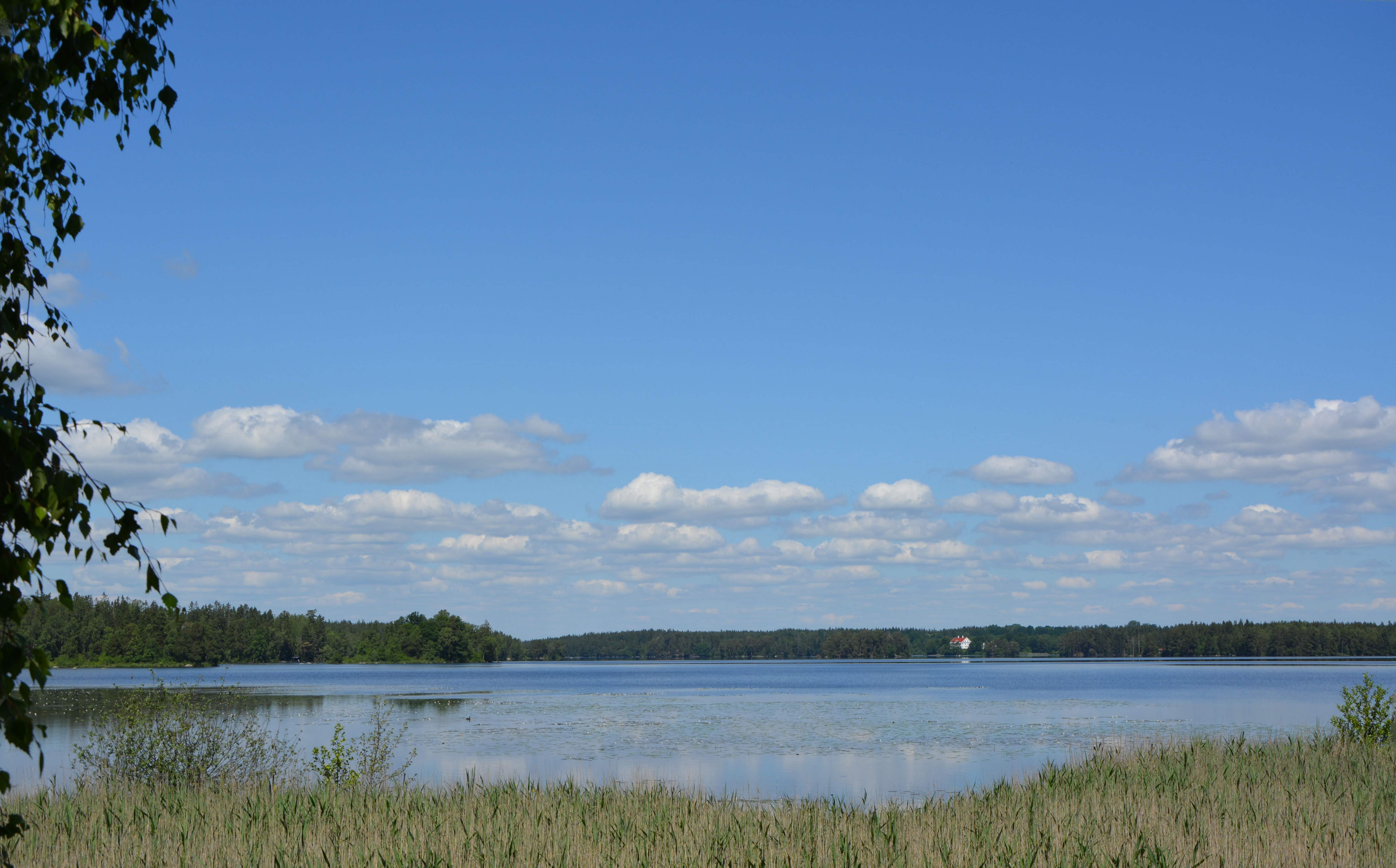 Örken är en sjö mellan Braås och Ramkvilla i Vetlanda kommun och Växjö kommun i Småland.